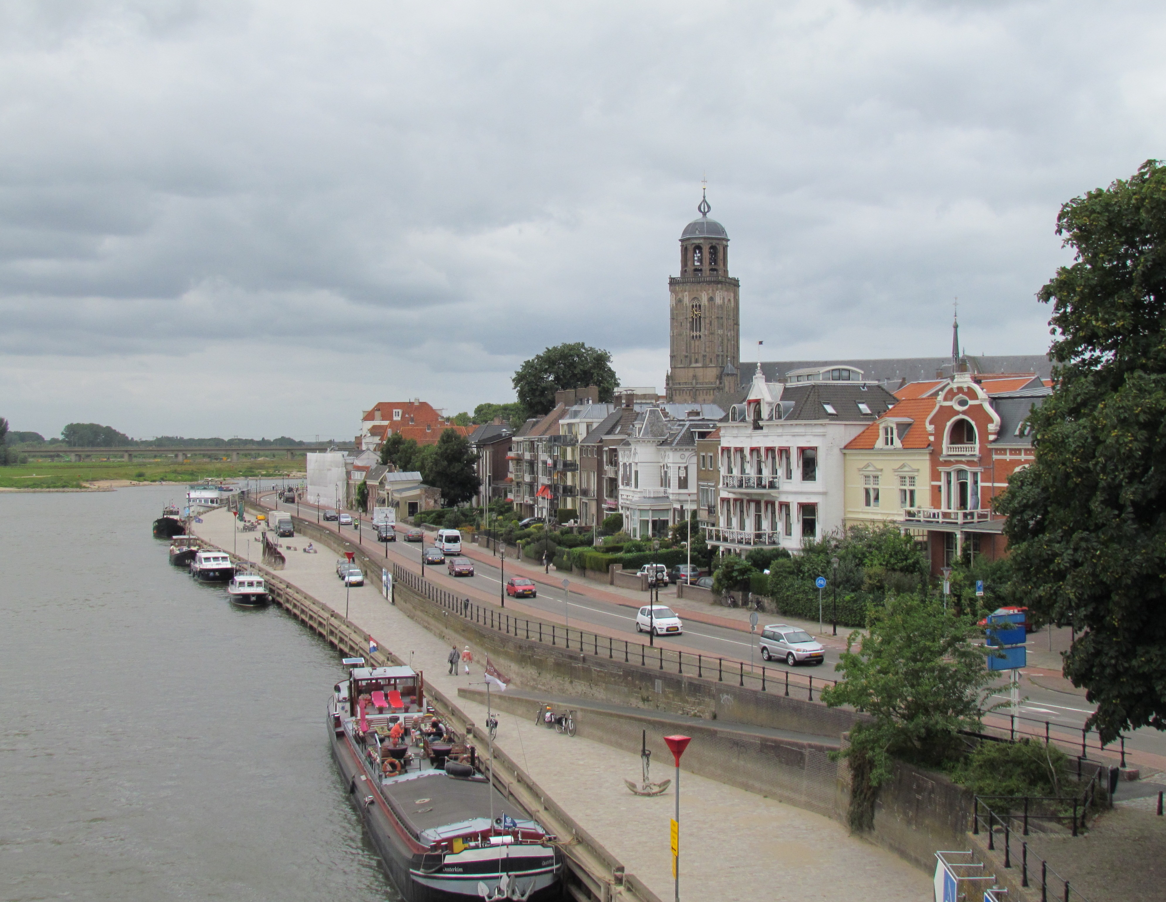 IJsselkade in Deventer: Welle